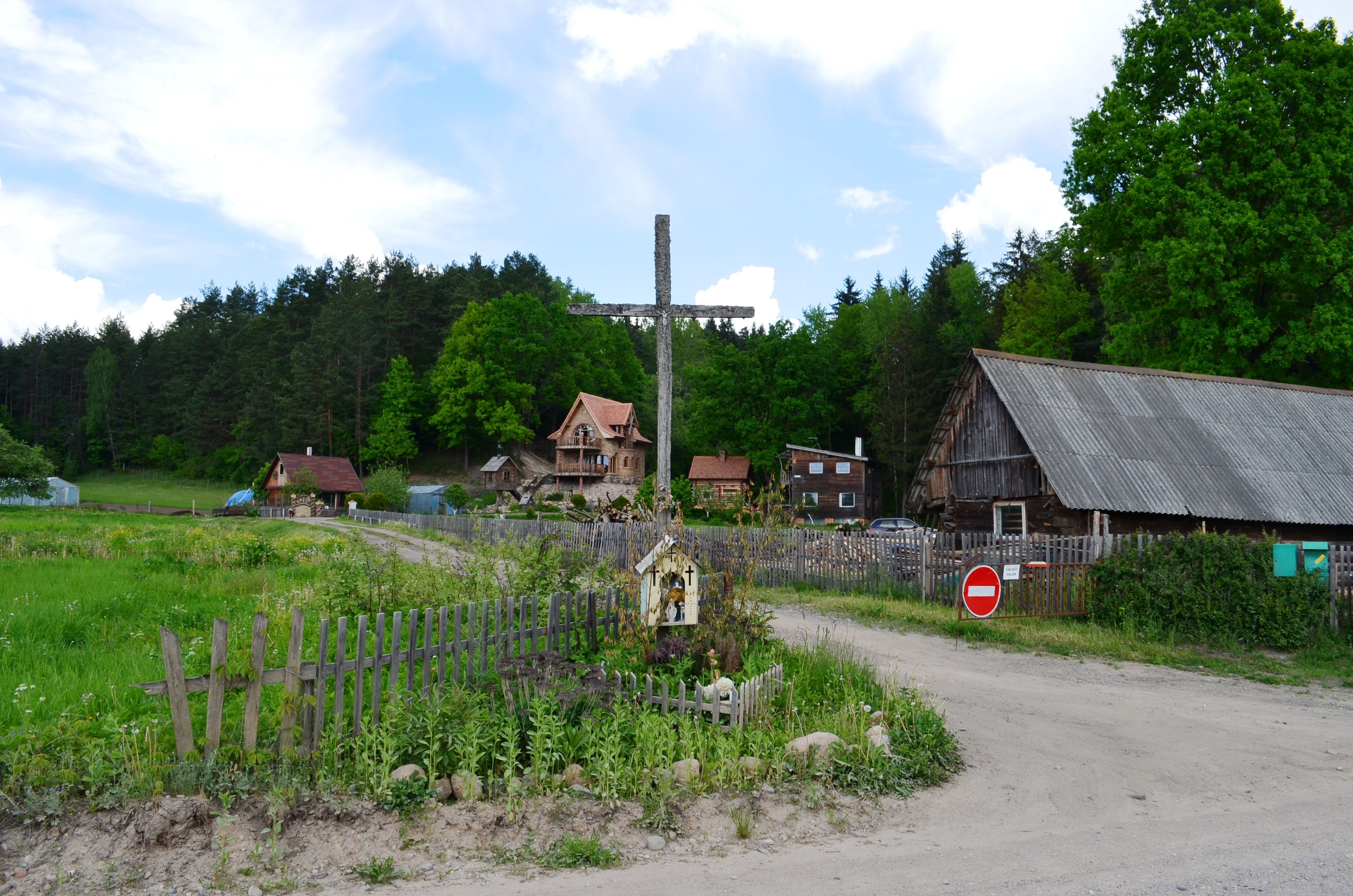 Kryžius, Smigliai, Vilniaus raj.